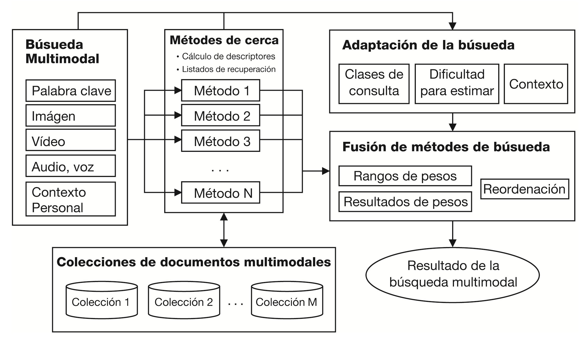 Esquema general del funcionamiento de una búsqueda multimodal